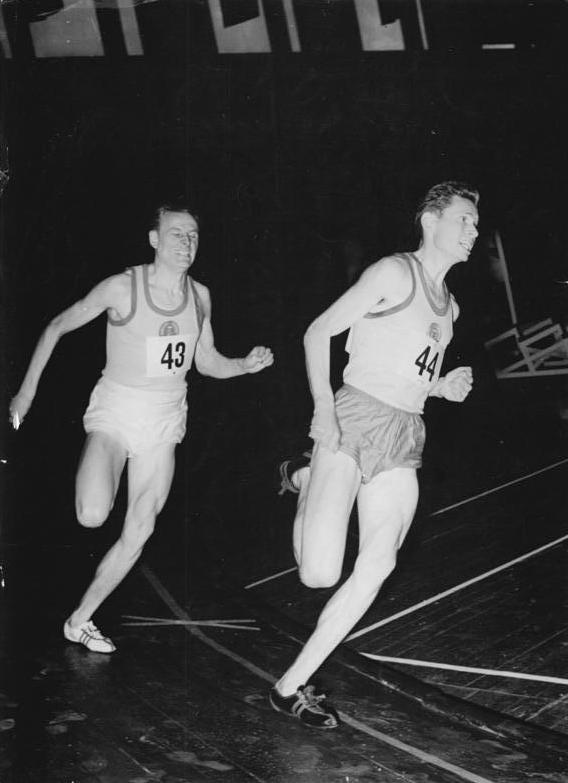 Werner Krause, Hans Grodotzki Zentralbild Wendorf 21.1.1962 Berliner Leichtathleten eröffneten Hallensaison Das erste Hallensportfest der Leichtathleten fand am 21.1.62 in der Berliner Dynamo-Sporthalle statt. UBz: Das mit grosser Spannung erwartetet 1500-m-Duell gewann der talentierte Läufer Werner Krause (ASK Vorwärts Berlin) (vorn) vor seinem Clubkameraden Hans Grodtzki.